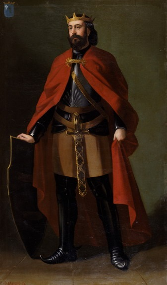 Retrato imaginario del rey Sancho Ramírez de Aragón († 1094), que fue hijo del rey Ramiro I de Aragón y de la reina Gisberga.